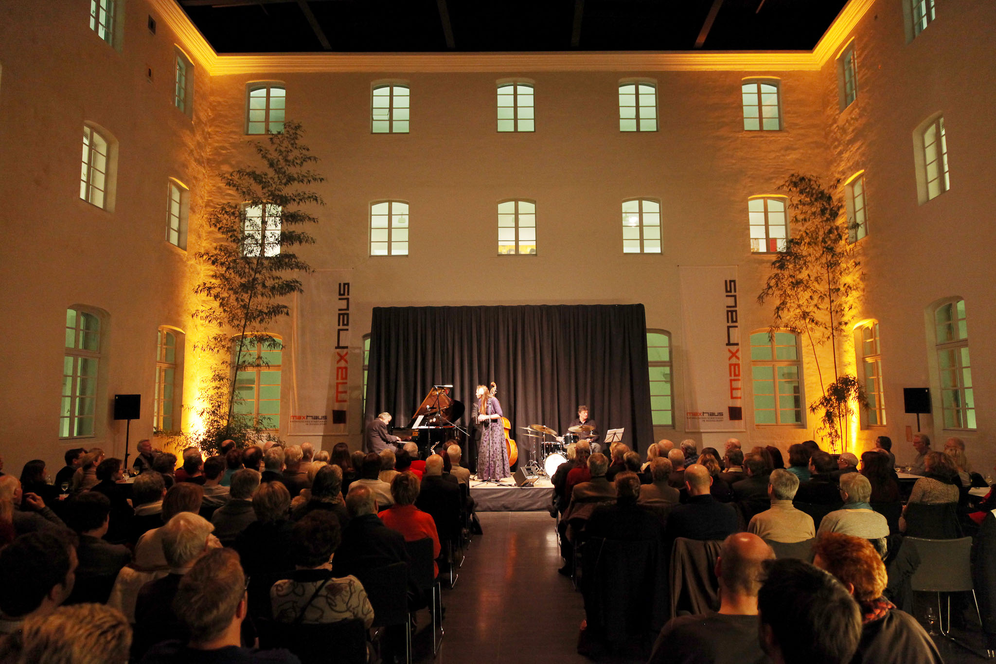 Maxhaus Düsseldorf, Konzert im Innenhof 2012